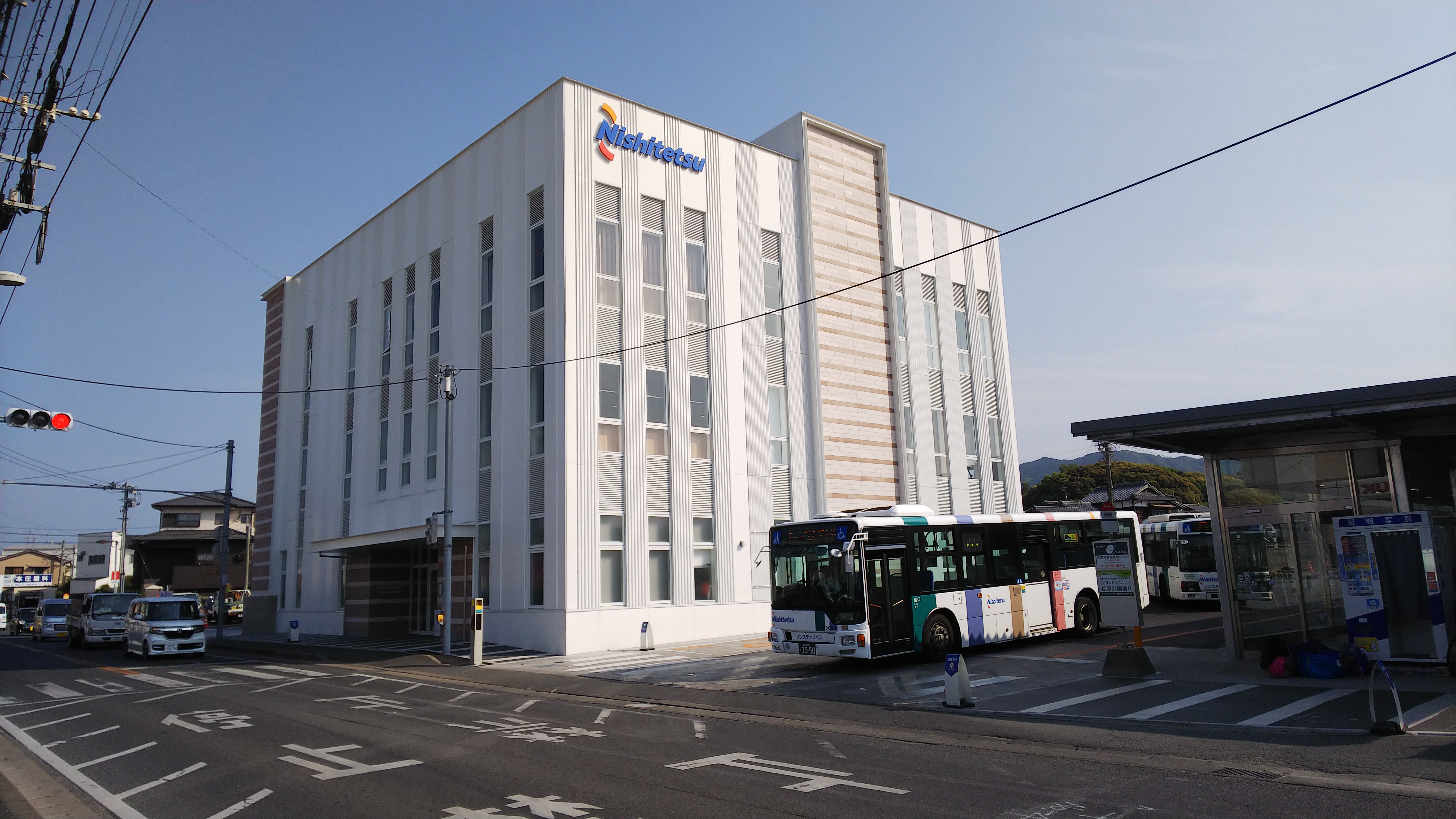 西鉄桧原営業所